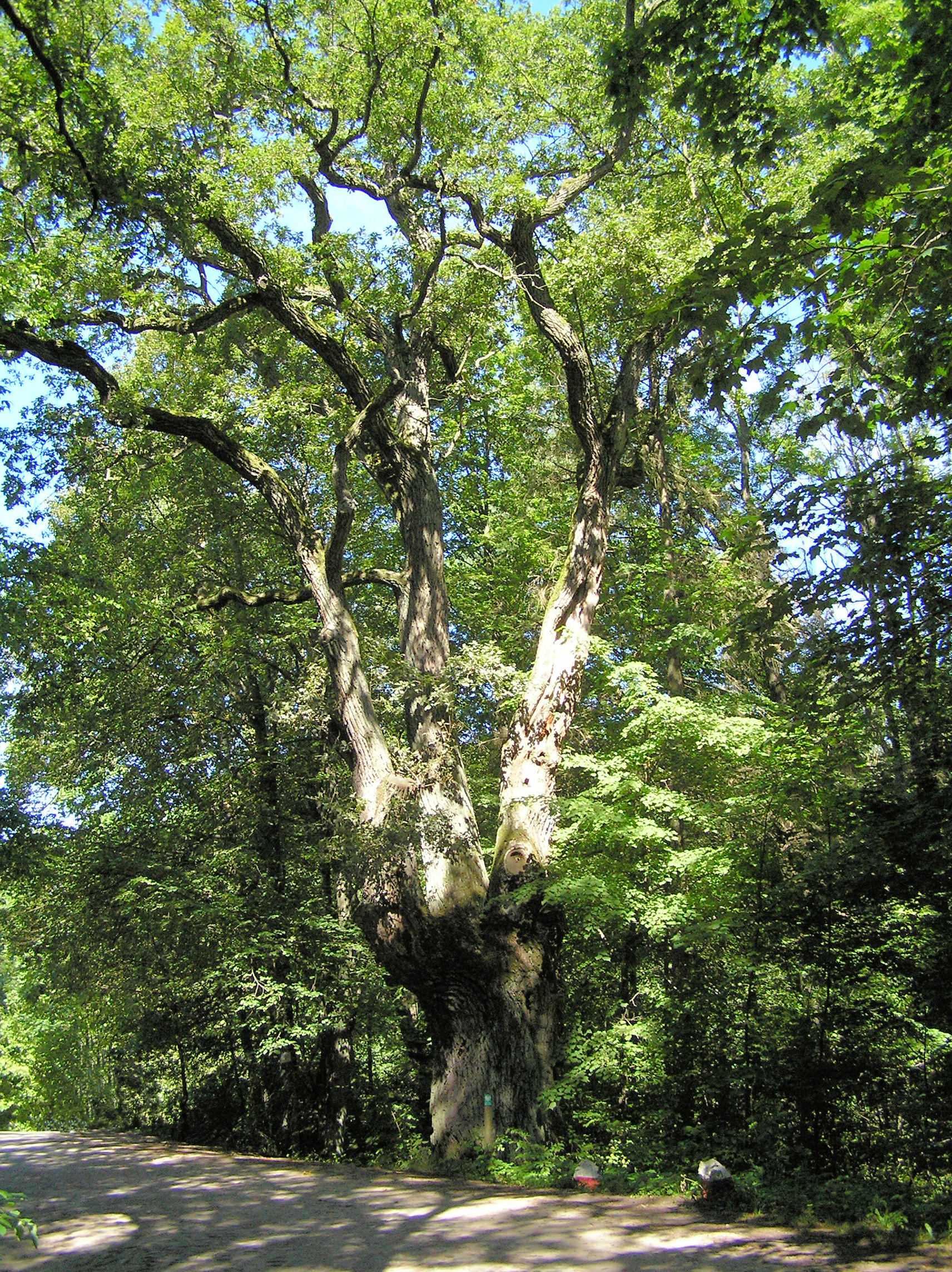 Świt - pomnikowy dąb.